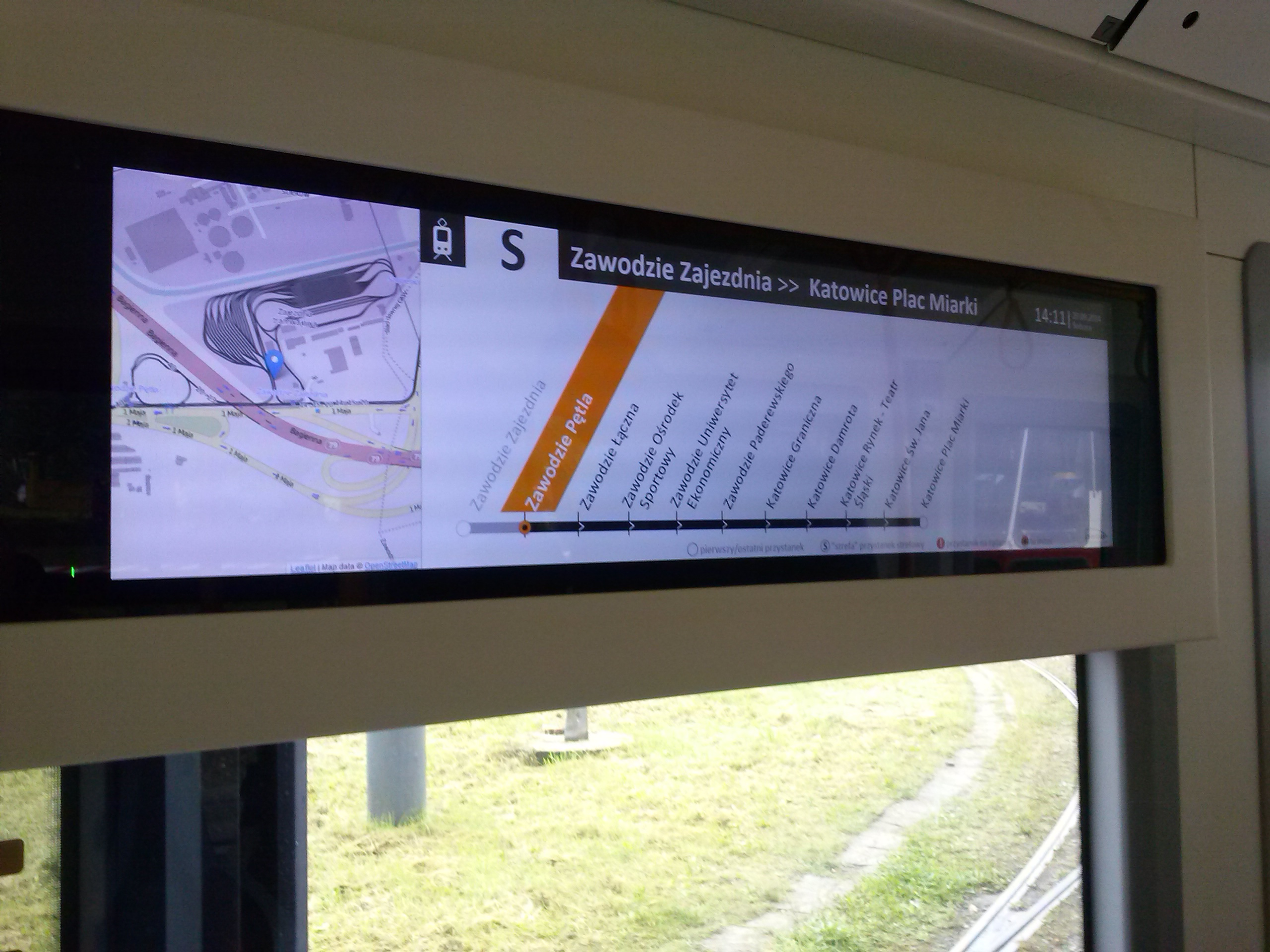 Pesa Twist 2012N - system informacji pasażerskiej nad oknem